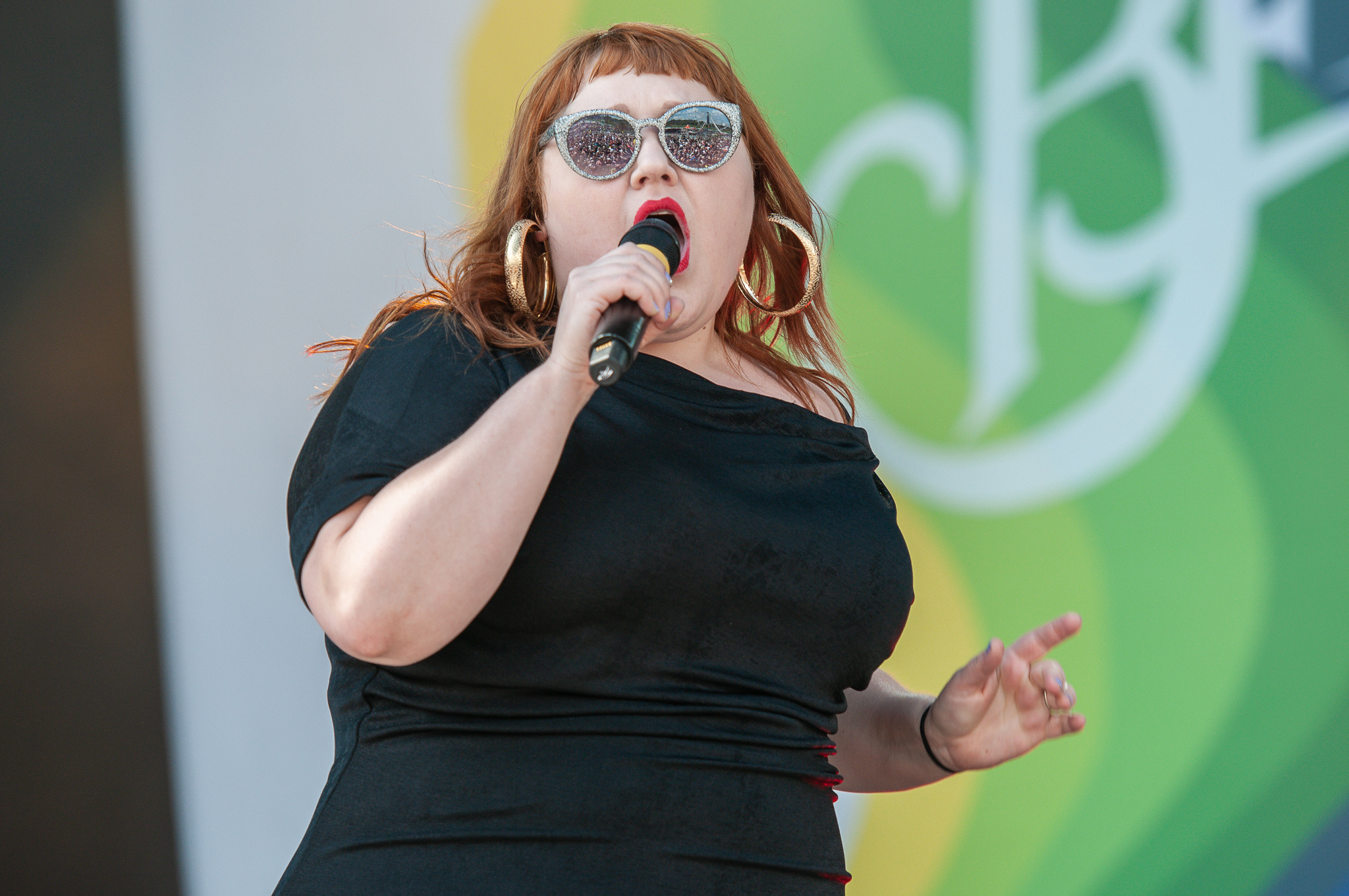 ARGO-Konzerte,Beth Ditto,Festival,Konzert,Livekonzert,Livemusik,Musik,RiP,Rock im Park 2018,Zeppelin Stage